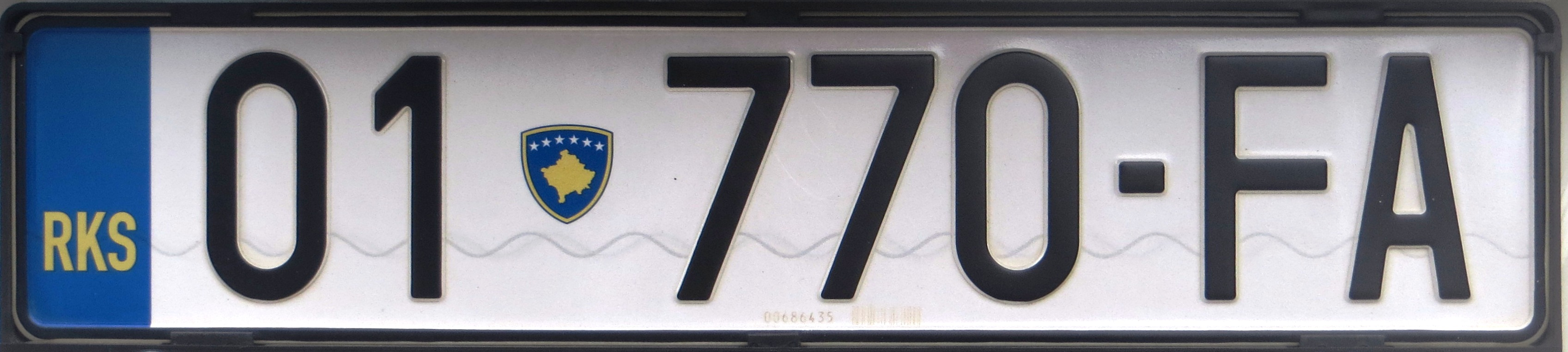 Kosovo kentekenplaat